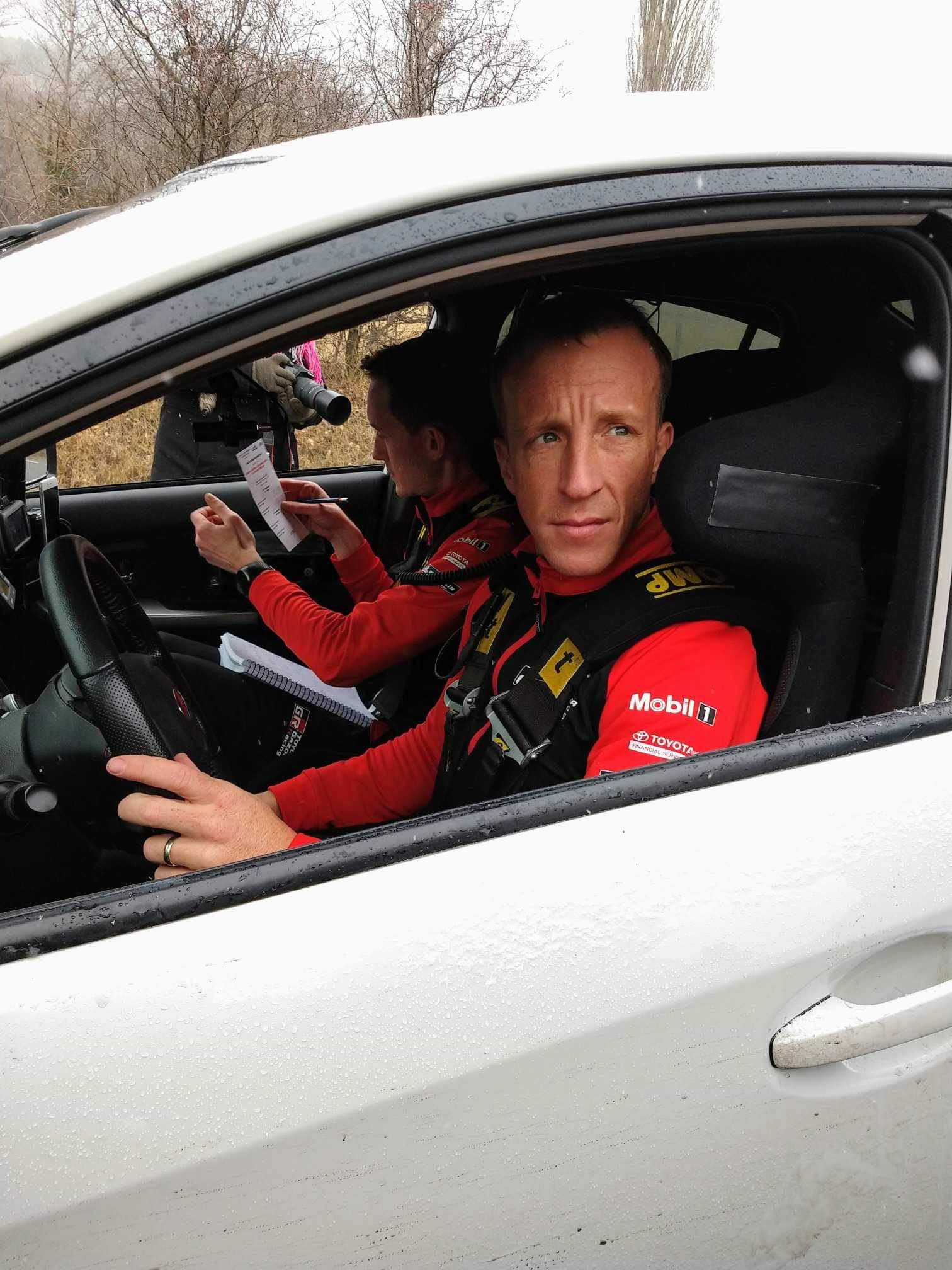 Kris Meeke durant les reconnaissances du Rallye Monte-Carlo 2019.